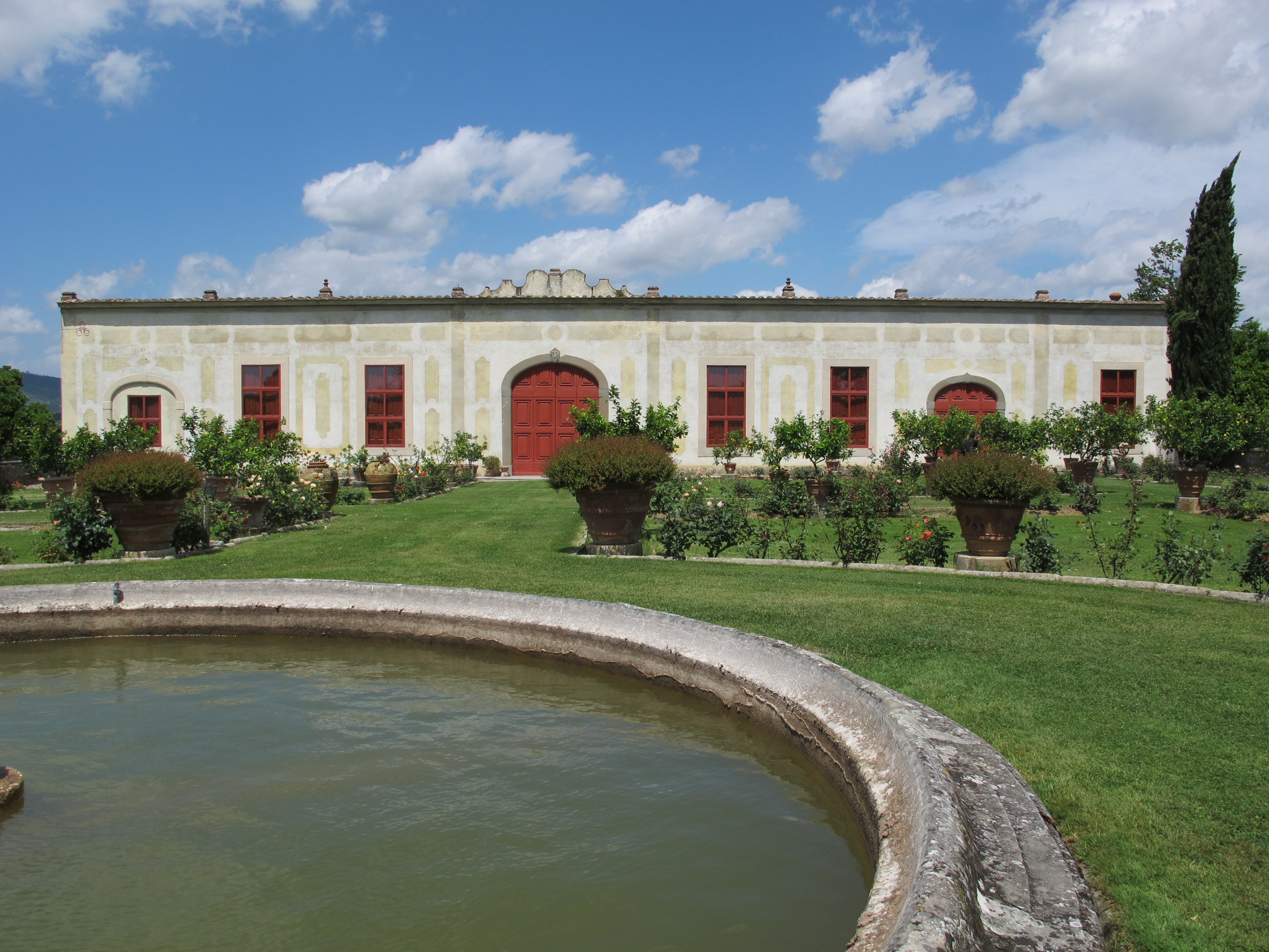 Villa la magia, giardino 07 limonaia